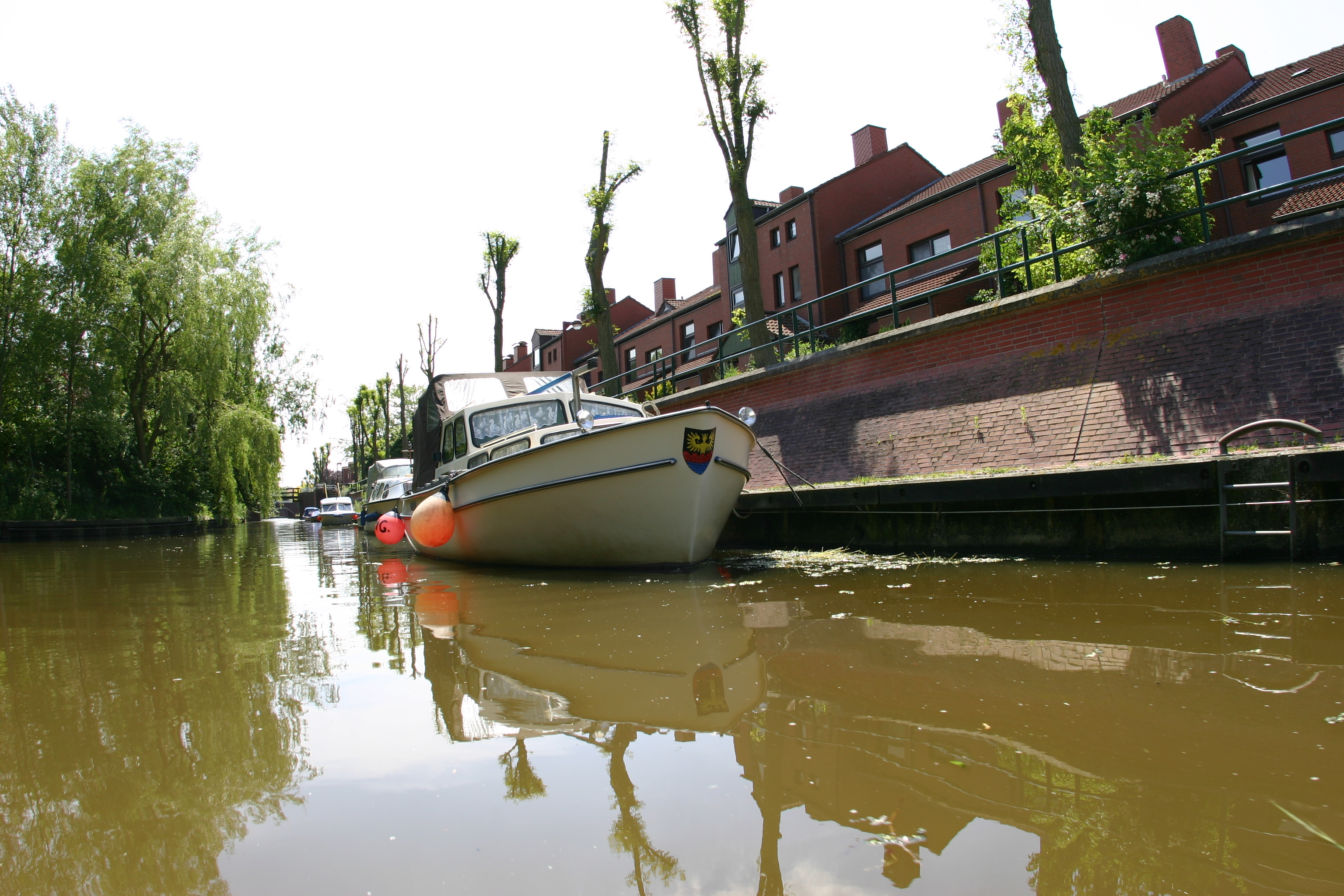 Emden, Stadtteil Constantia, Groote Gracht